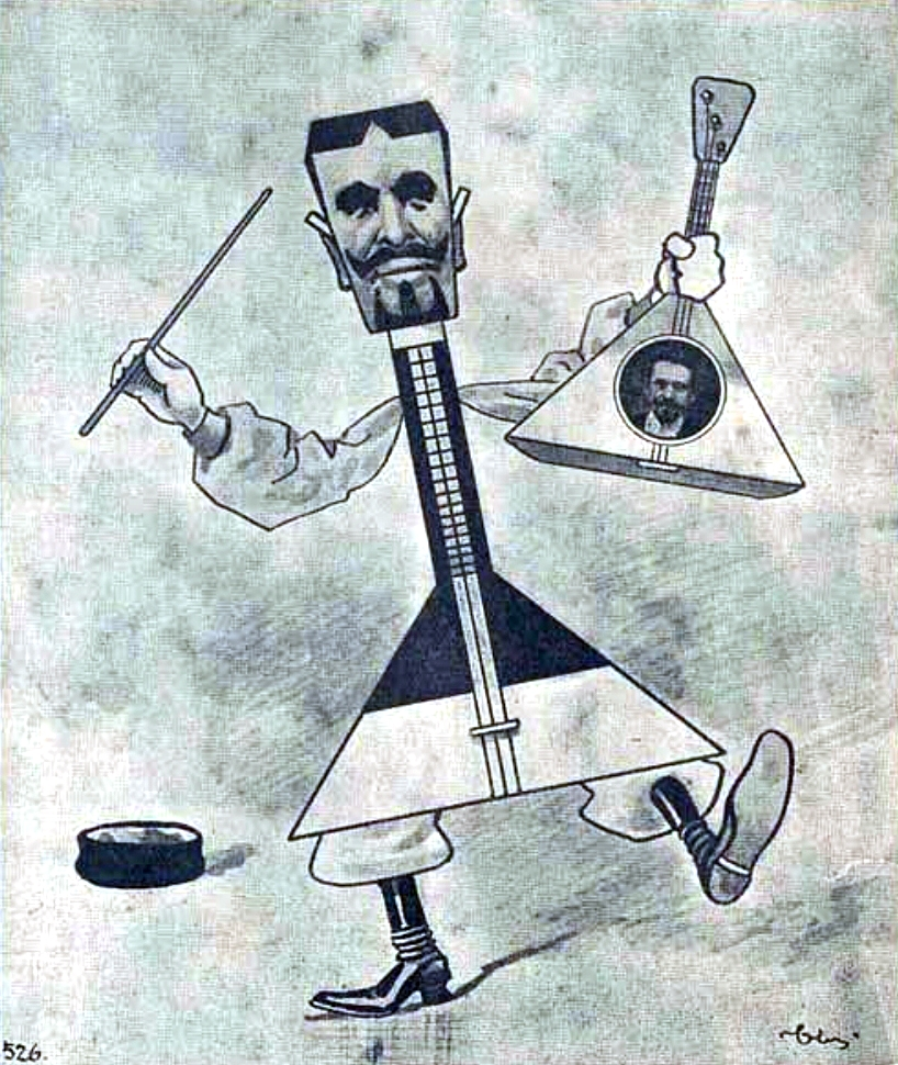 Карикатура на В.В. Андреева в журнале «Стрекоза», 1903 год